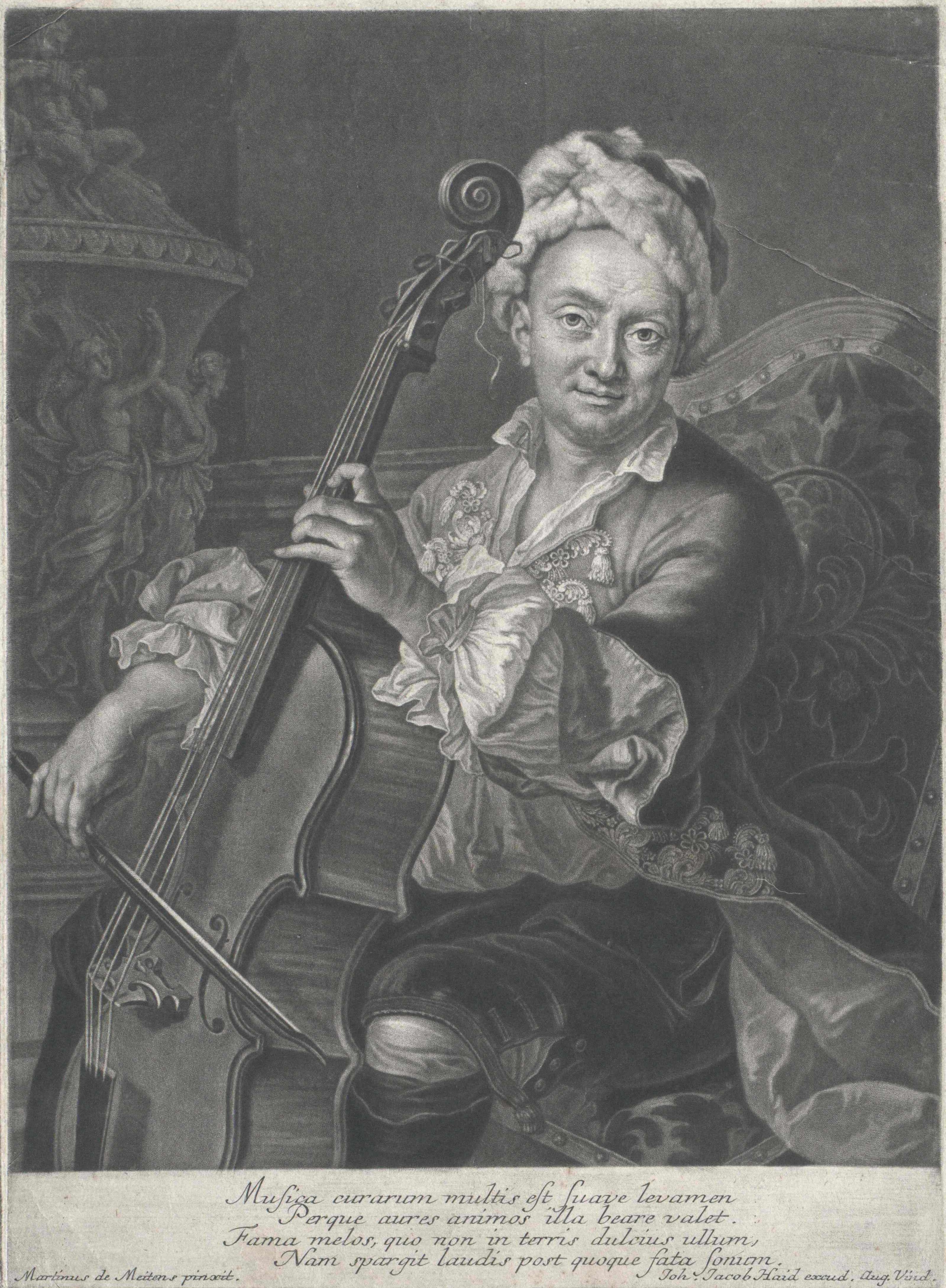 "Franciscello"; Francesco Alborea (1691-1739) Wien, Österreichische Nationalbibliothek, Bildarchiv und Grafiksammlung, Porträtsammlung, Inventar-Nr. PORT_00155553_01